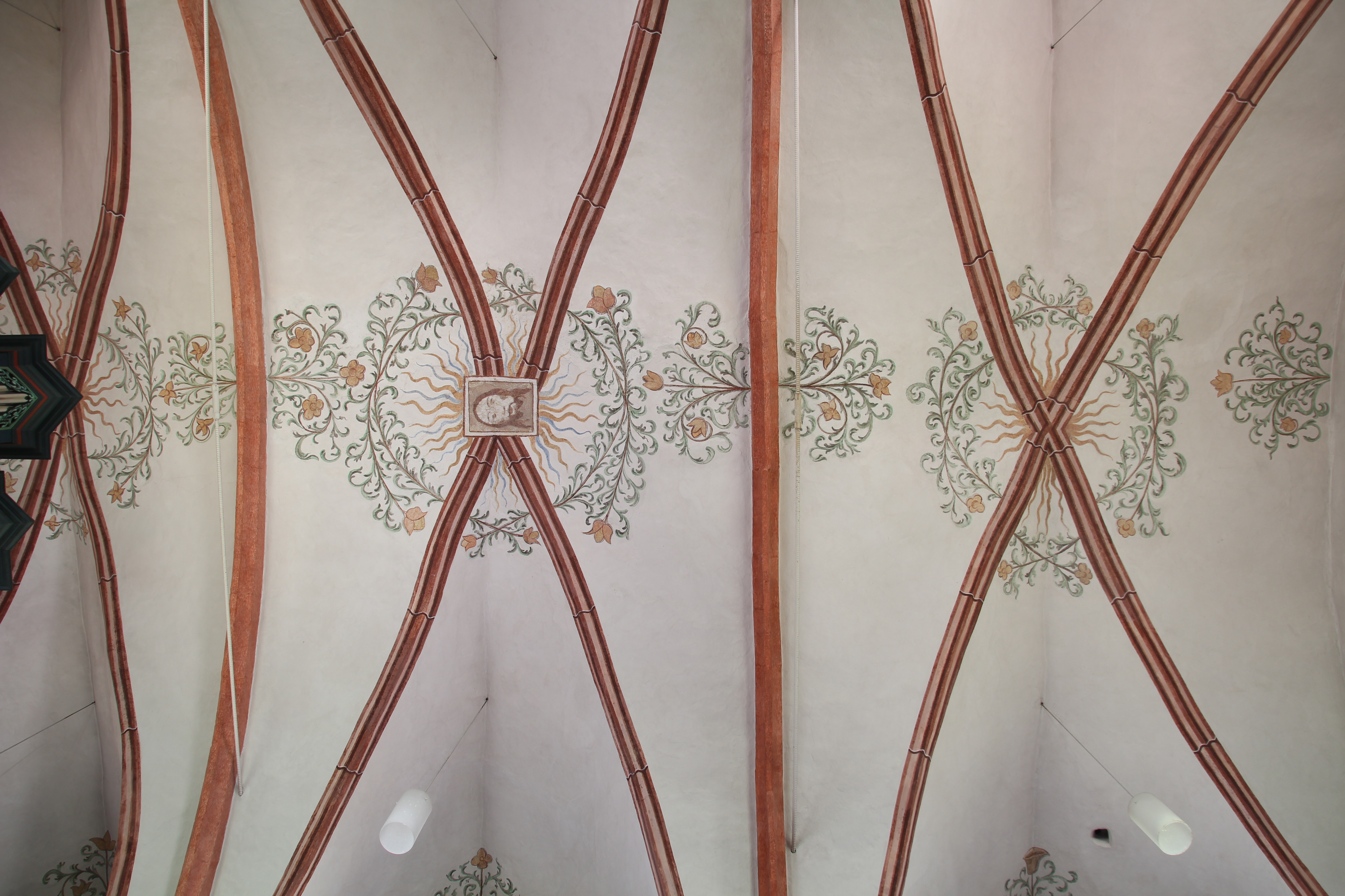 Siehe Bild und Dateiname